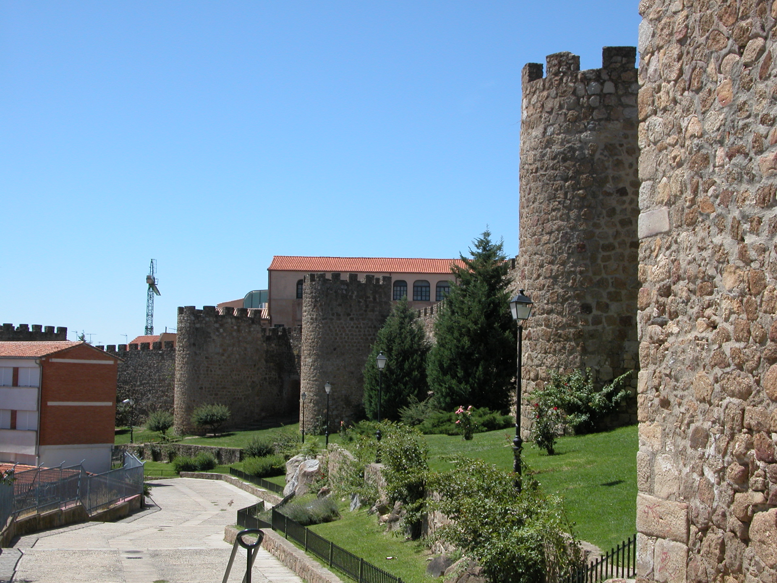 Murallas de Plasencia